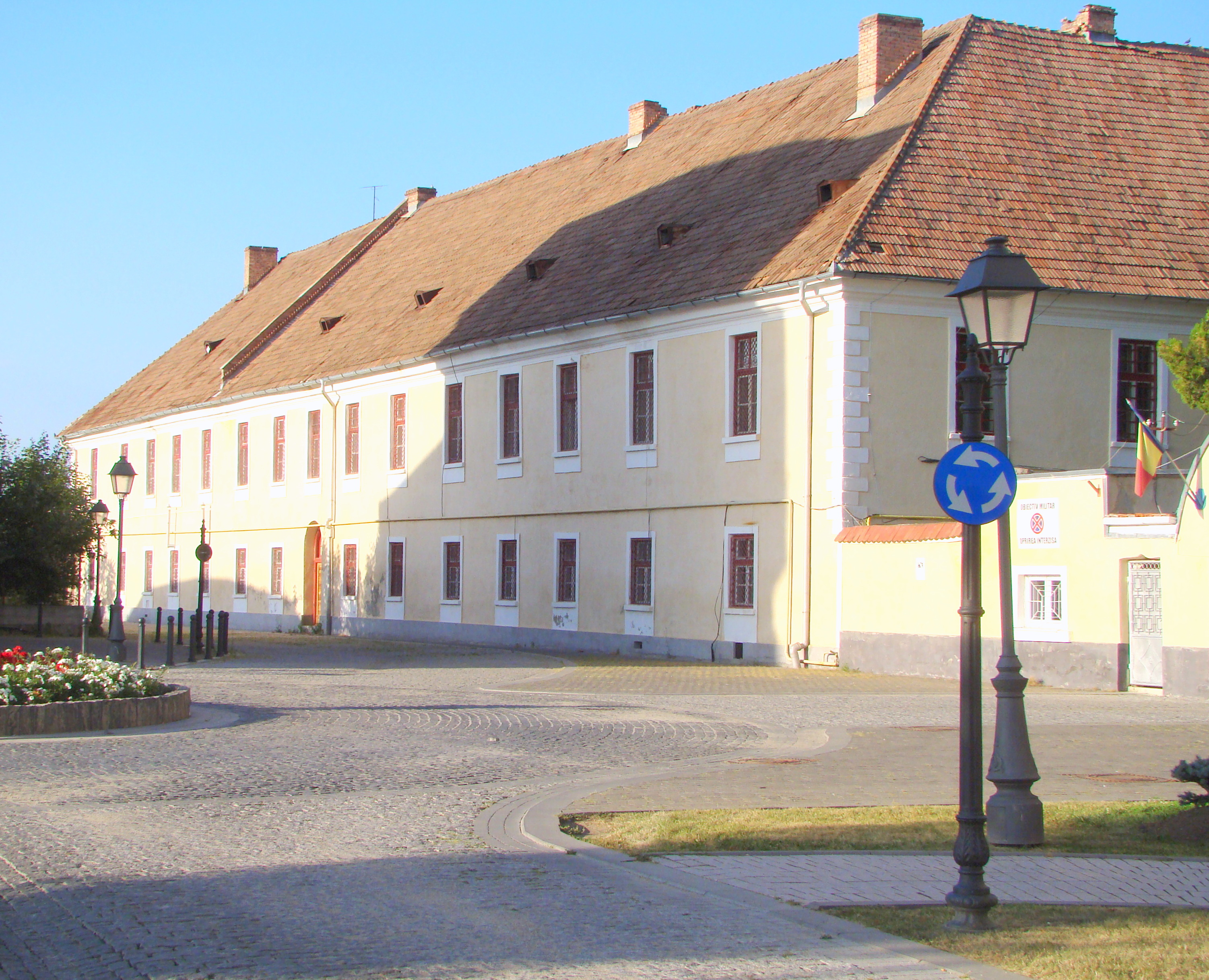 Colegiul Bethlen, Str. Suluțiu Alexandru Sterca 2, municipiul Alba Iulia